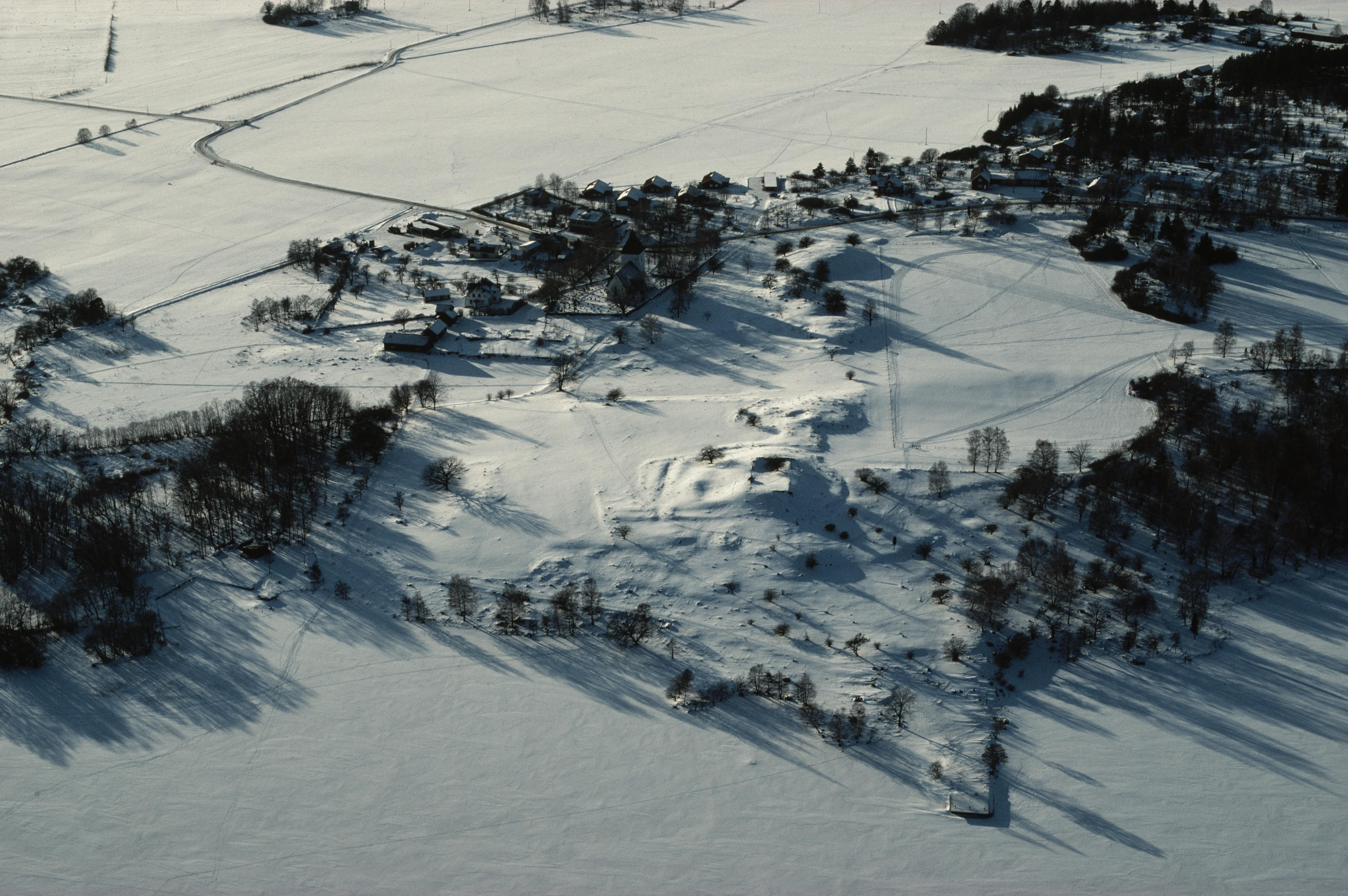 Alsnö hus (RAÄ Adelsö 47:1), Hovgården och Adelsö kyrka. Motiv: Adelsö Nyckelord: Flygbilder, Raä-Fastigheter, Riksintressen, Vintermotiv, Världsarv Kategori: Insjömiljöer Alsnö hus (RAÄ Adelsö 47:1), Hovgården och Adelsö kyrka.